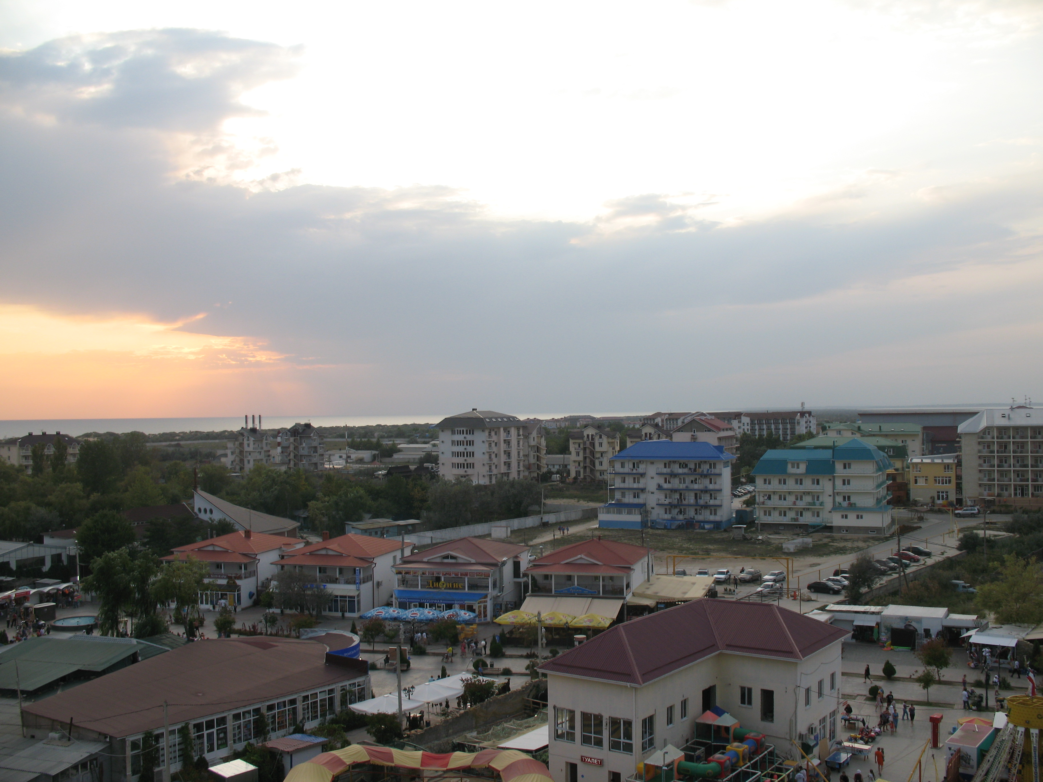 Витязево. Фотография с колеса обозрения.